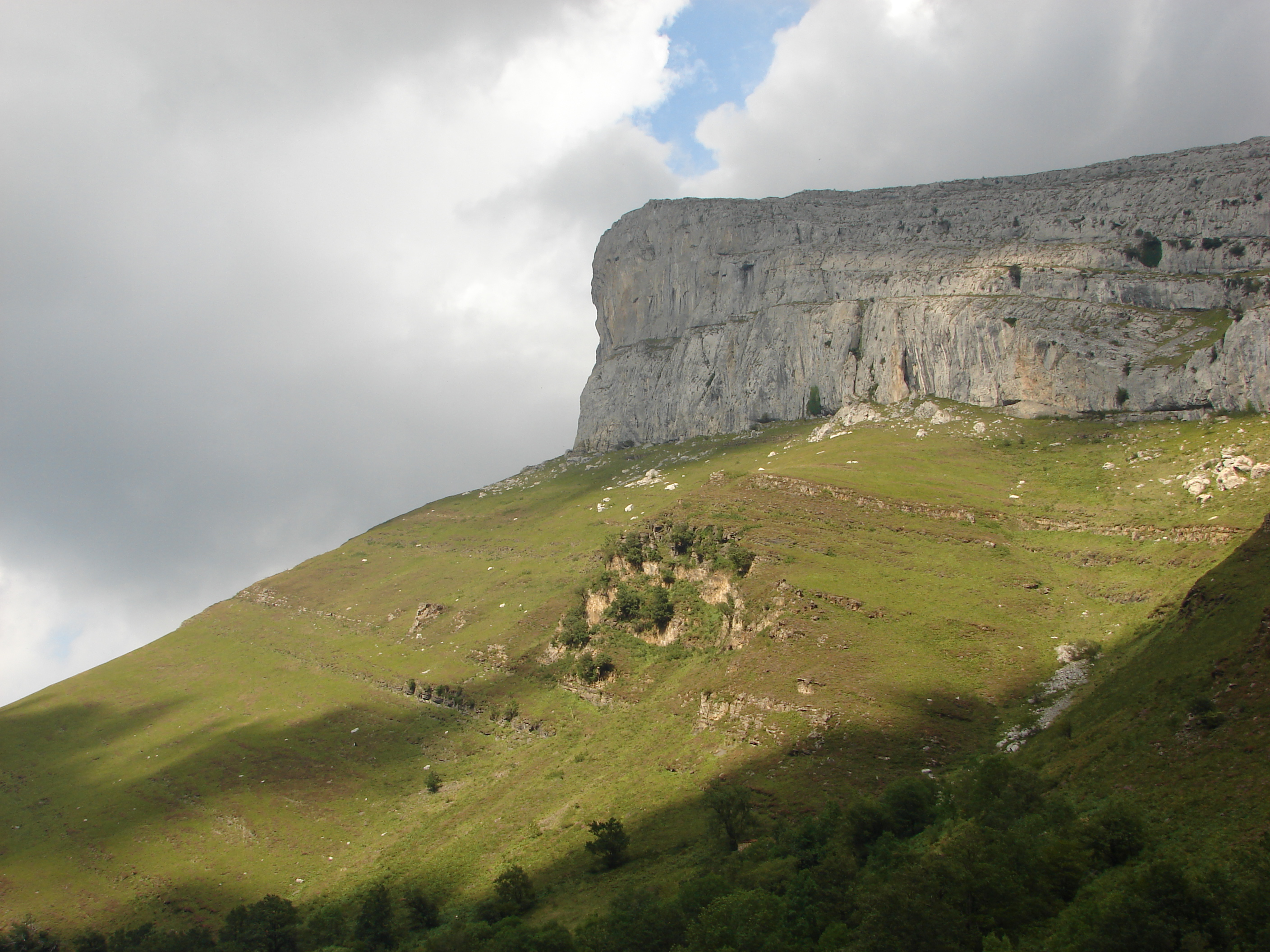 Peña Rucías en el Parque Natural Collados del Asón. Cantabria